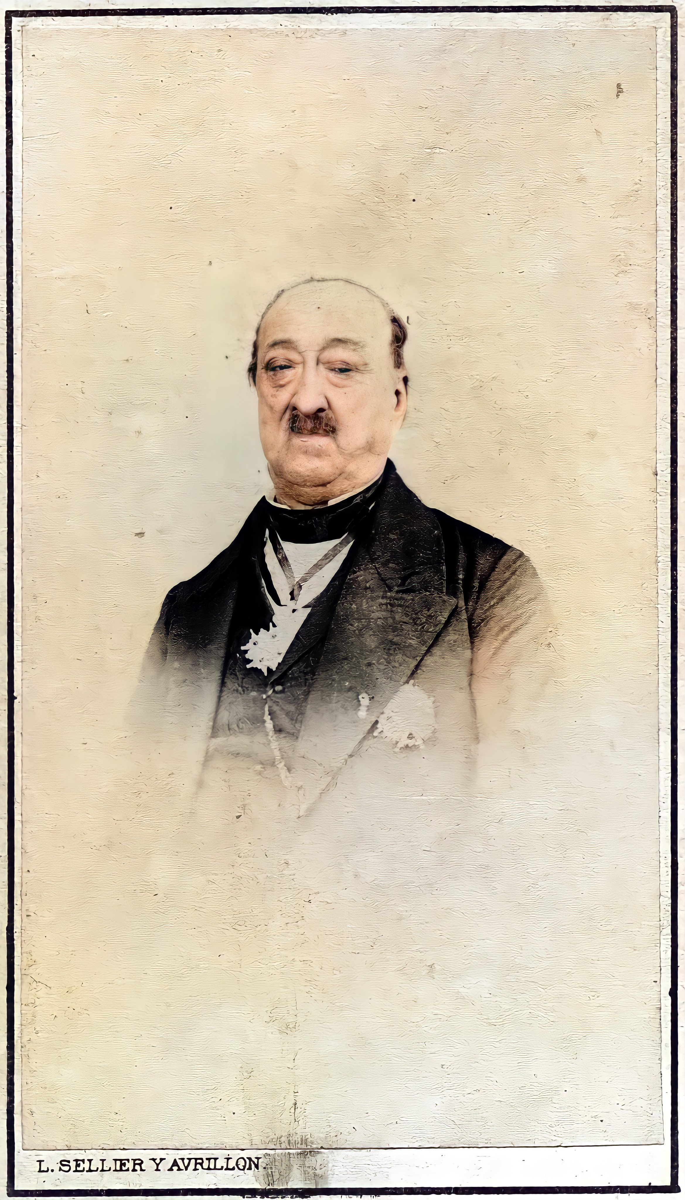 Fotografía de don José María Bermúdez de Castro y Pardo (1872)